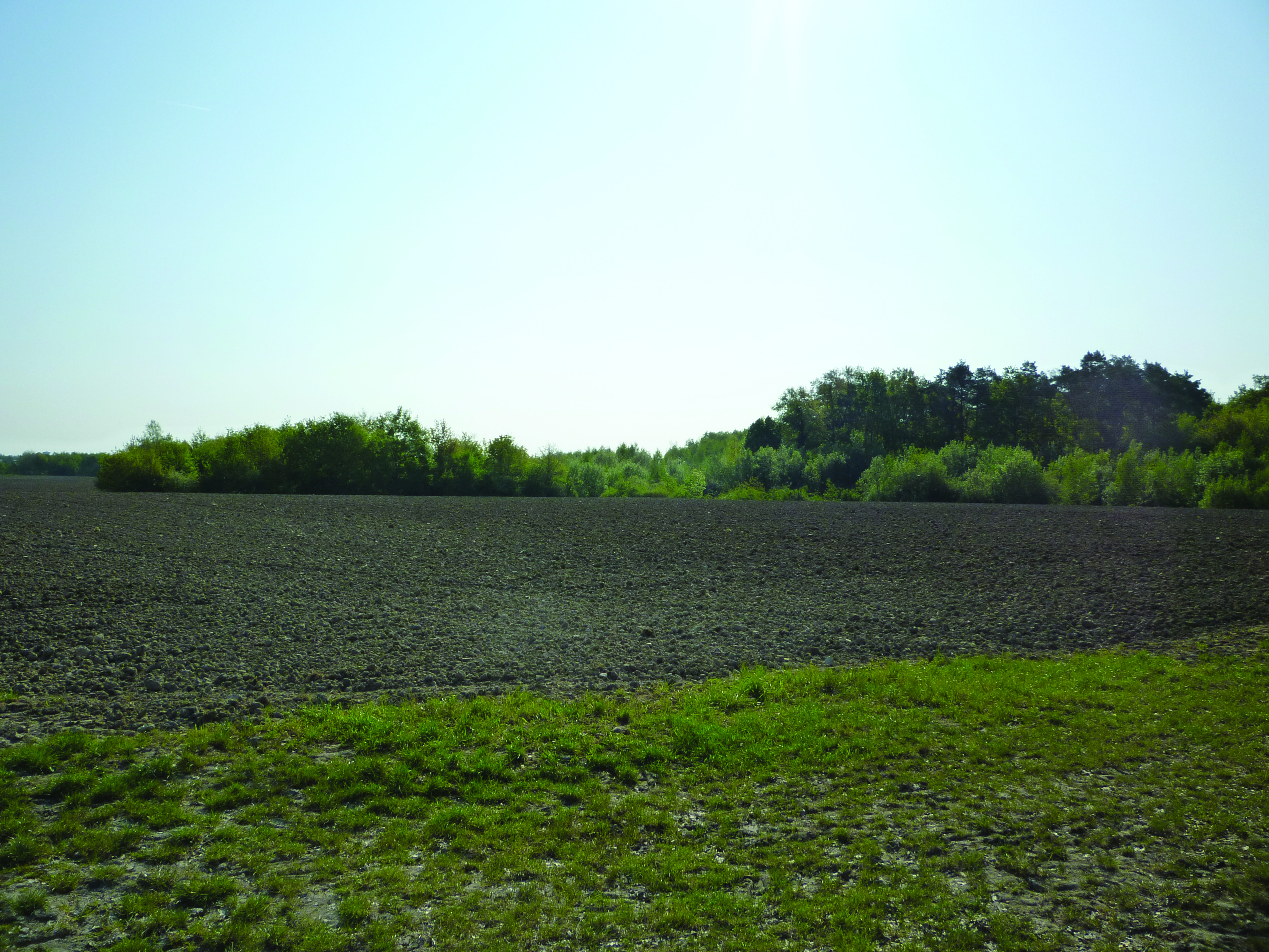 vue prise de la rue du Ran d'Abas